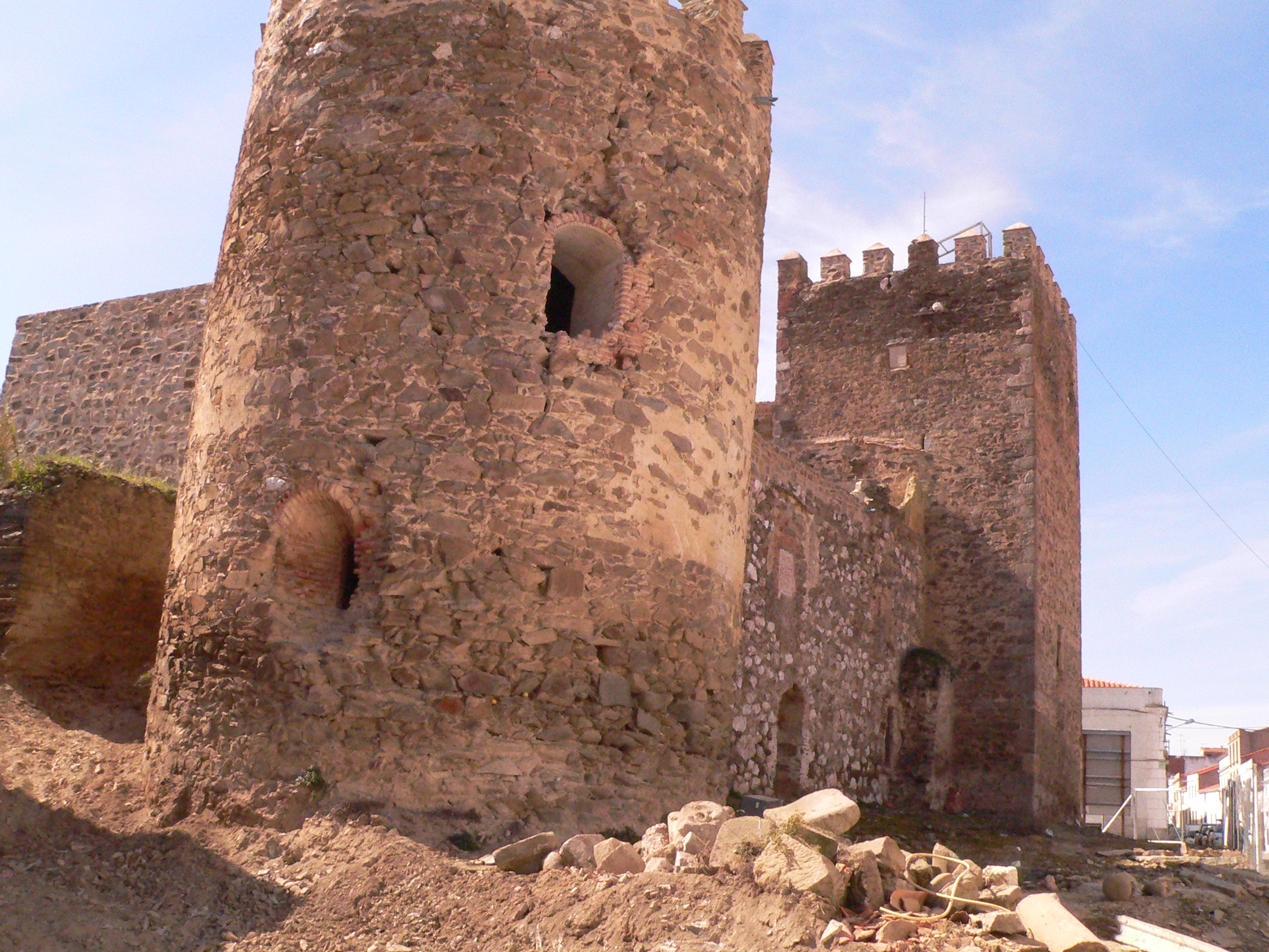 Torre redonda de la Casa Palaico de los Atamiranos en Orellana la Vieja (Badajoz)